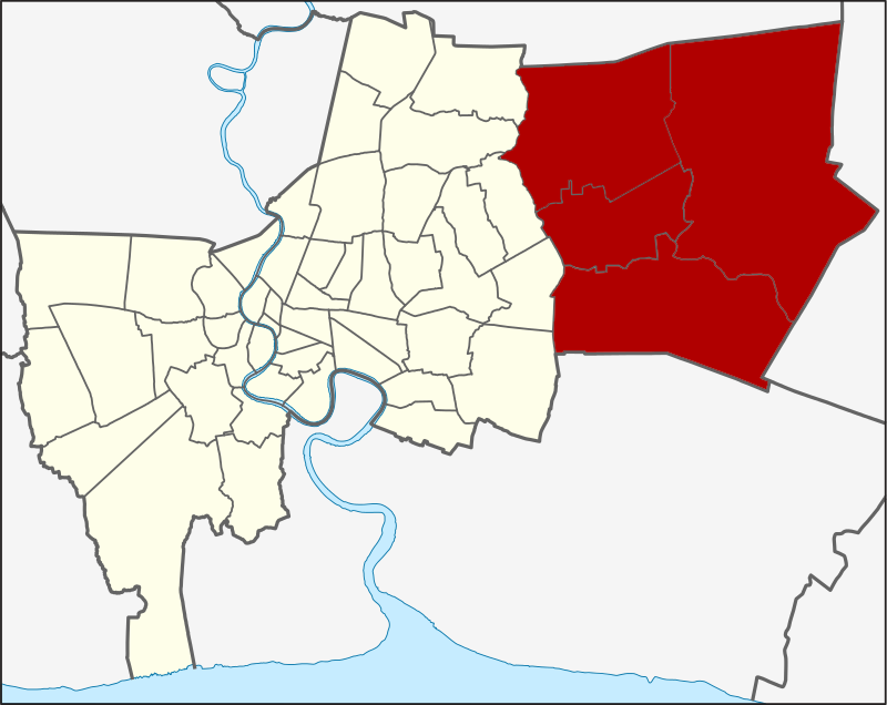 เขตการปกครองออกเป็น 4 อำเภอ ได้แก่ อำเภอคลองสามวา อำเภอแสนแสบ อำเภอหนองจอก และอำเภอเจียรดับ หรือ อำเภอในคลองเจียรดับ